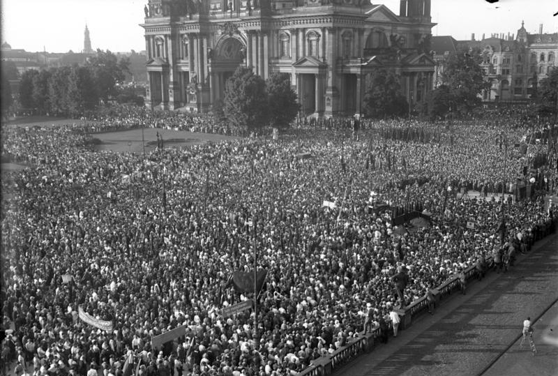 Die Republikaner Berlins, das Reichsbanner und die Eiserne Front hielten ihre erste grosse Versammlung zur Reichstagswahl im Lustgarten in Berlin ab ! Blick auf die hunderttausend versammelte Republikaner im Lustgarten in Berlin.